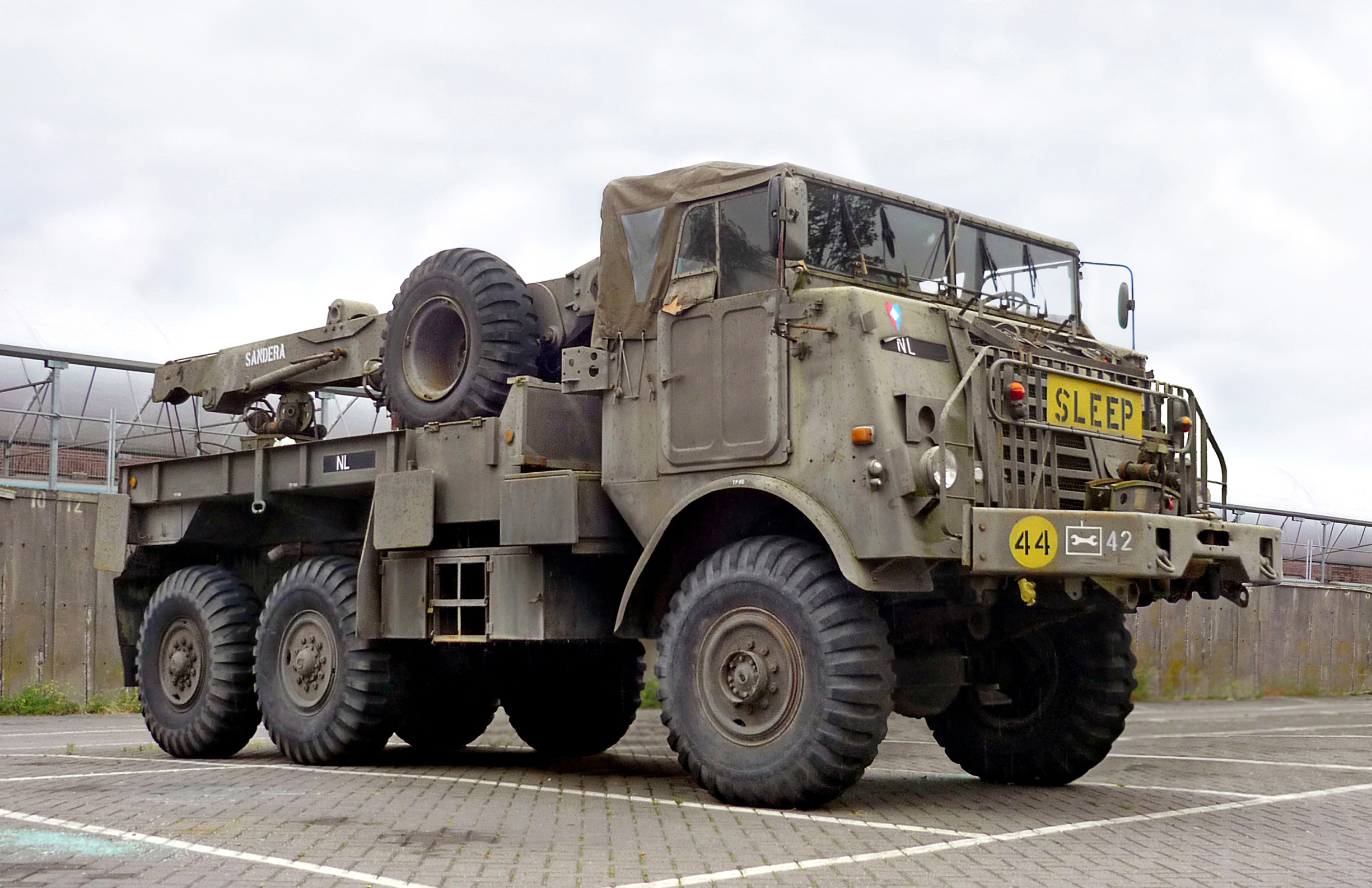 Ex. Koninklijke Landmacht Bergingsvoertuig Kraan : Austin-Western Motor : Continental Red Seal R. 9.9 L, V6, 204 hp at 2800 rpm 6 tons, 6x6 Brandstofverbruik : 1/1 Productie aantal : 95 Voormalig legeronderdeel : 42e Herstelcompagnie Foto : Havenstraat, Amsterdam, 2012